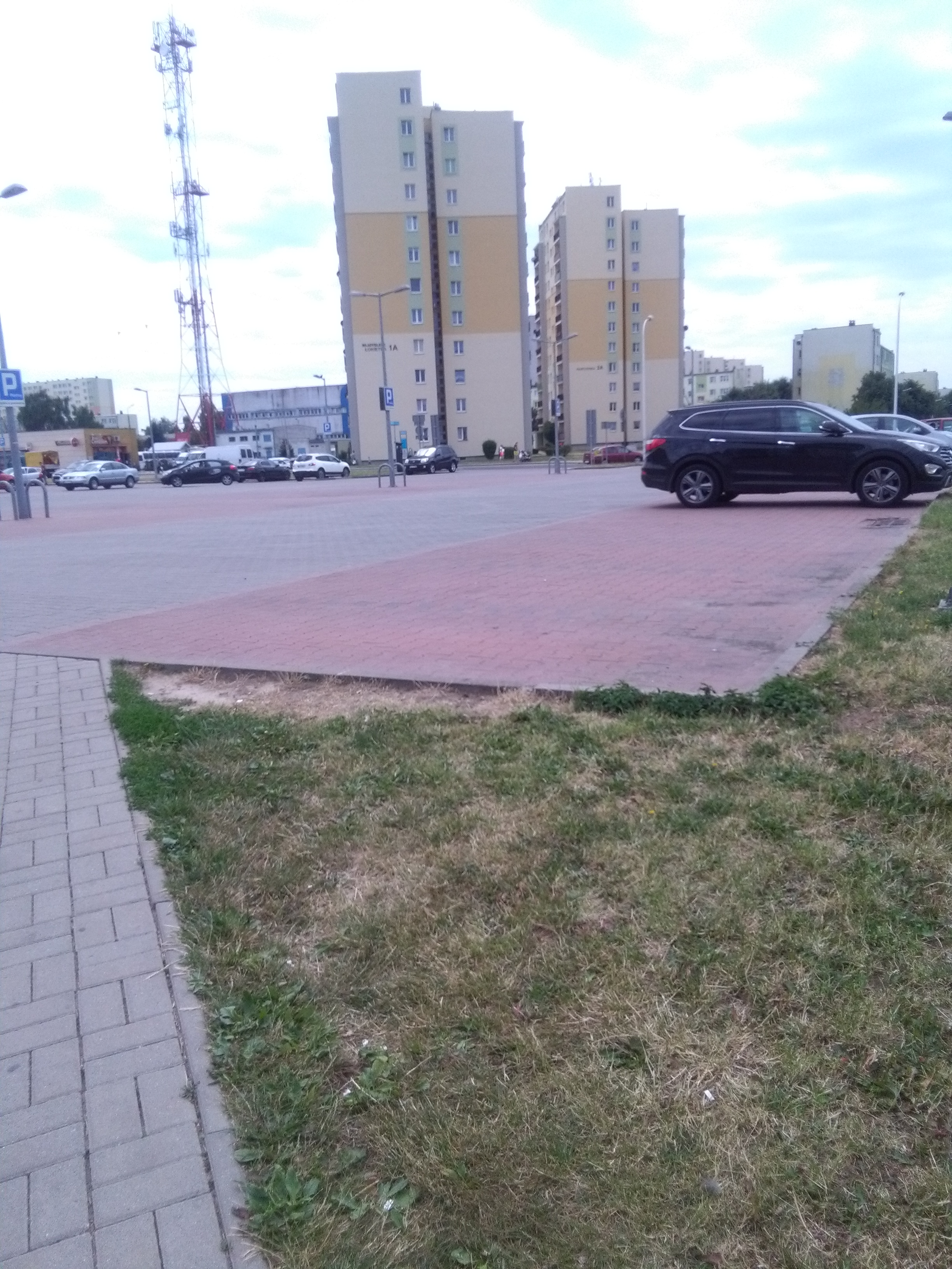 Miasto Sieradz widziane z ulicy. Sarańskiej (jedne z Sieradzkich wieżowców)